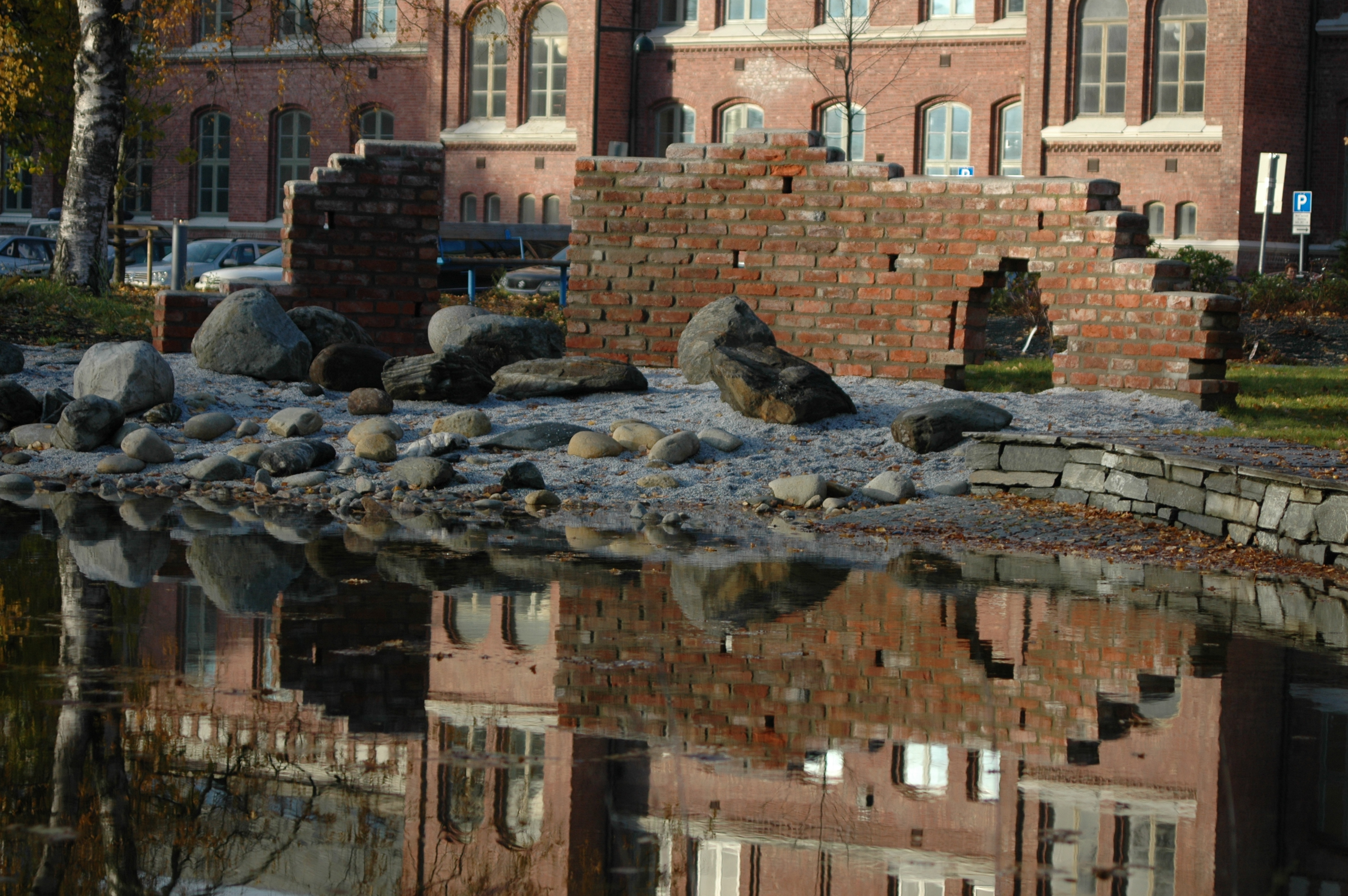 Dammen i opplevelsesparken, sykehusparken, St. Olavs hospital. Kunstner: Solrunn Rones